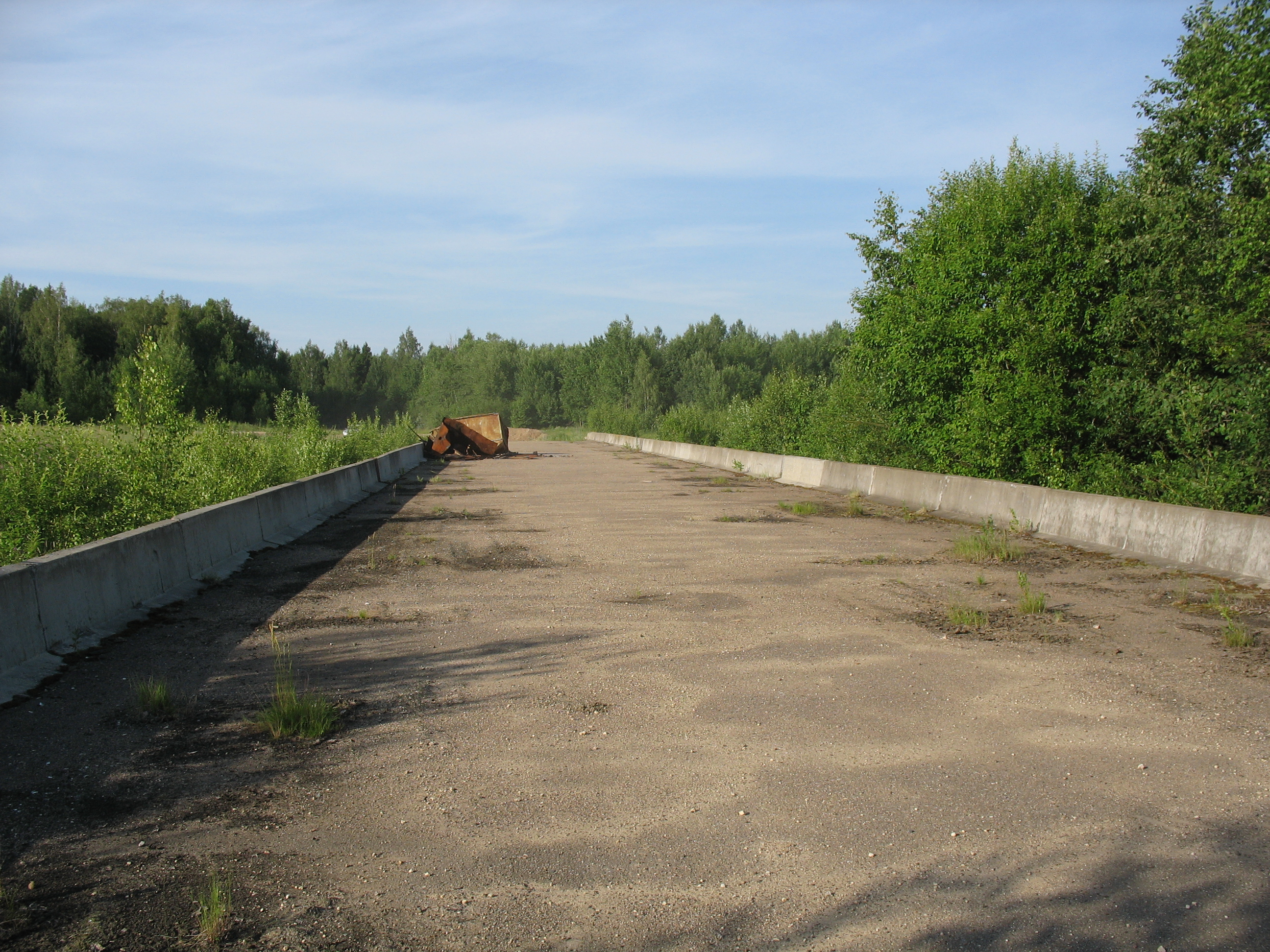 Автомобильный путепровод над планировавшимся железнодорожным карьером